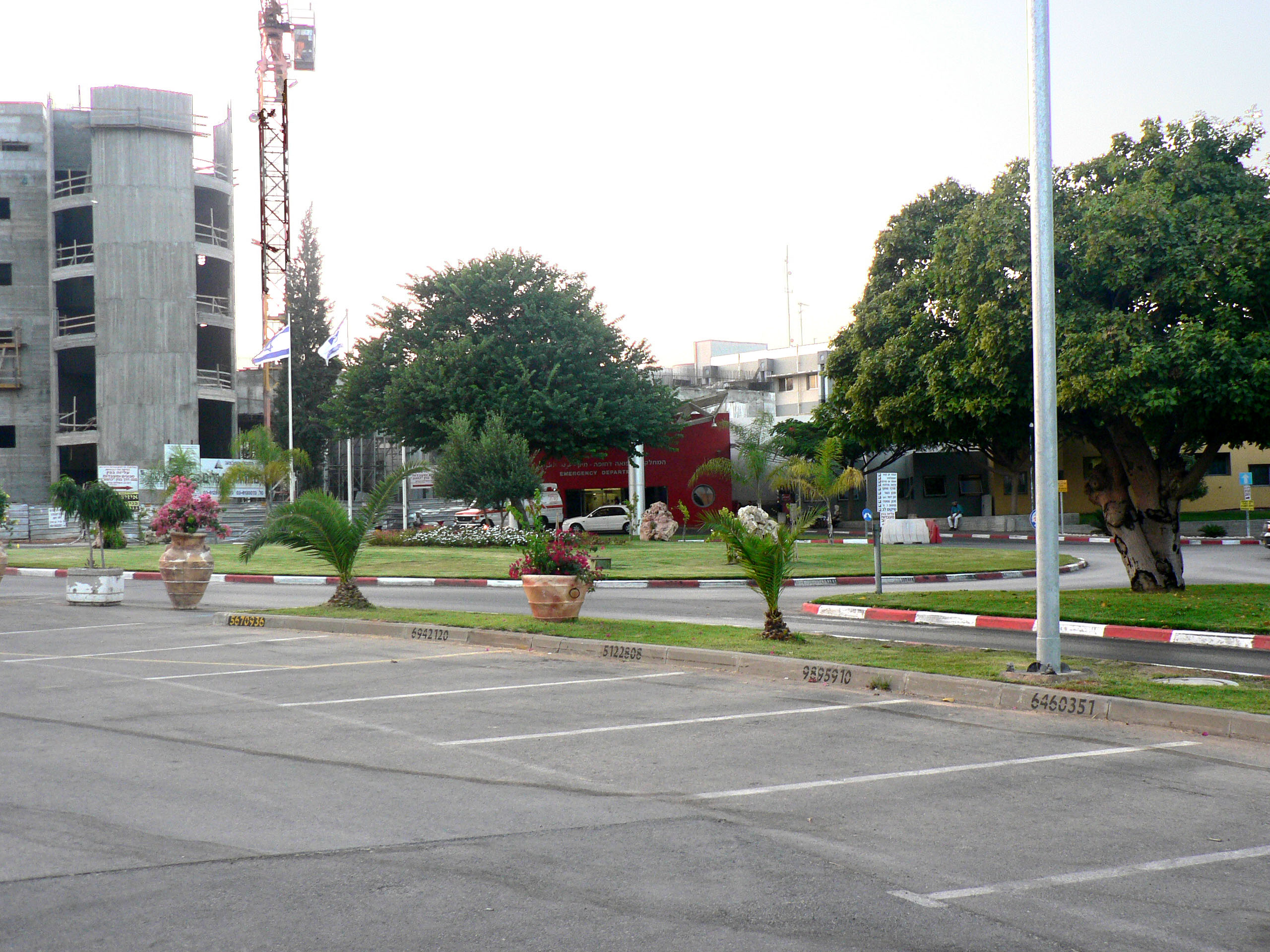 Asaf Harofe Hospital, Rishon LeZion, Israel מרכז רפואי בית חולים אסף הרופא, ראשון לציון, ישראל